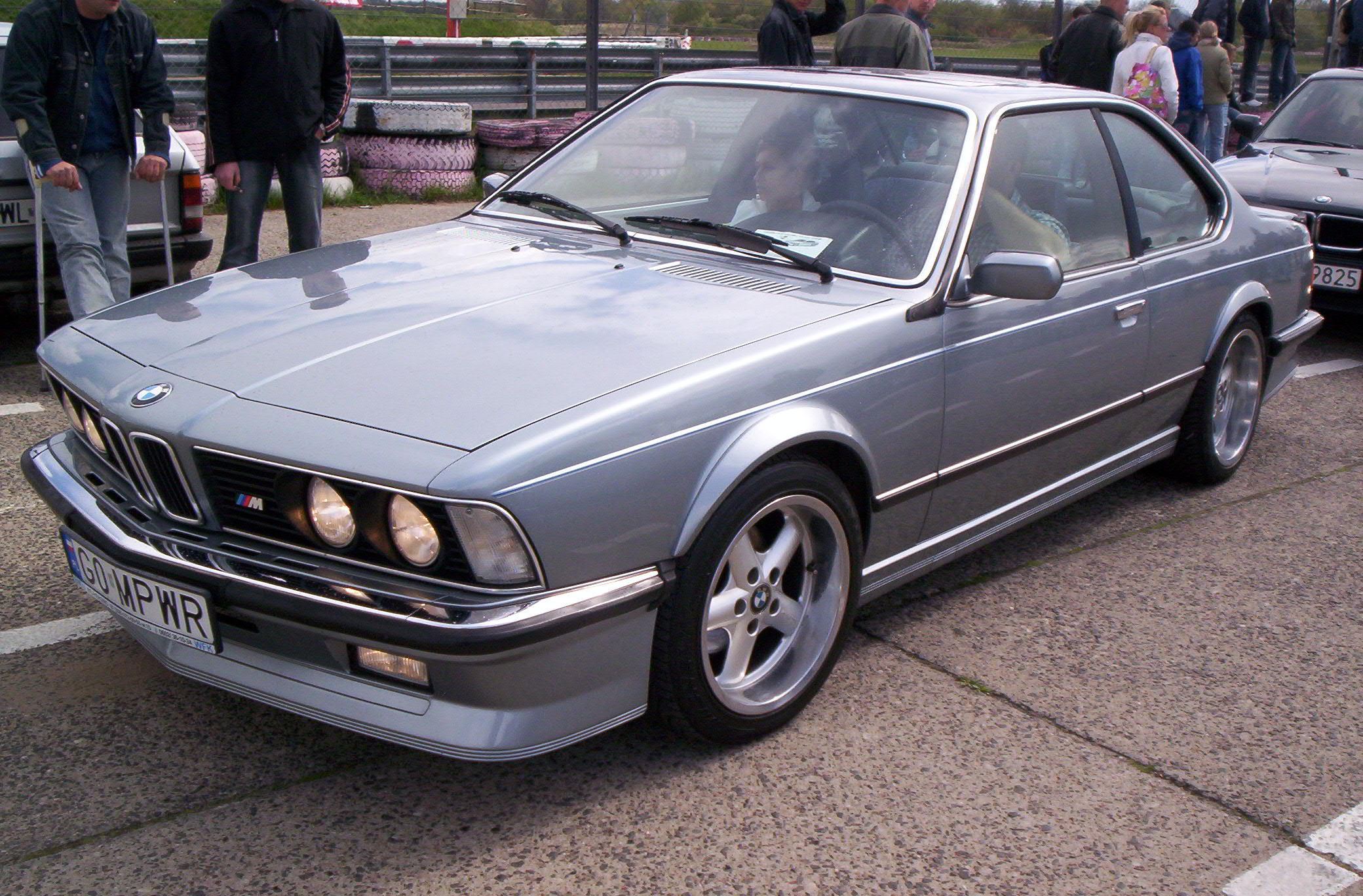 BMW e24 M635CSi,1985 february, Cosmosblau Metallic; Zlot BMW M Power Club w Toruniu.